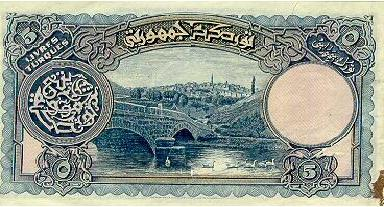 E1 serisi 5TL'nin arka yüzü